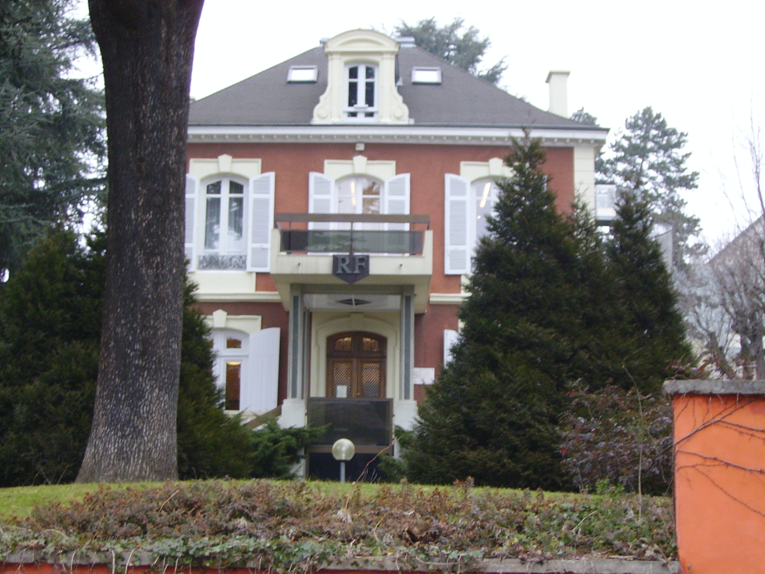 Mairie de Fontaines-sur-Saône Photo AV Monteux - 24/02/2006